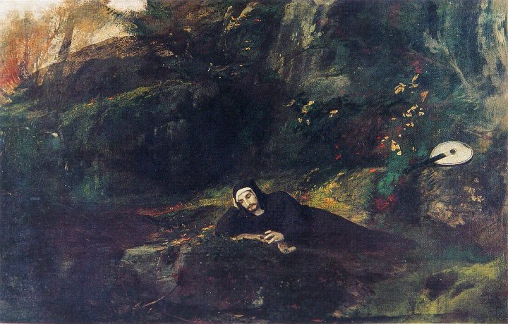 label QS:Lru,"Поэт Петрарка" label QS:Lde,"Der Dichter Petrarca"